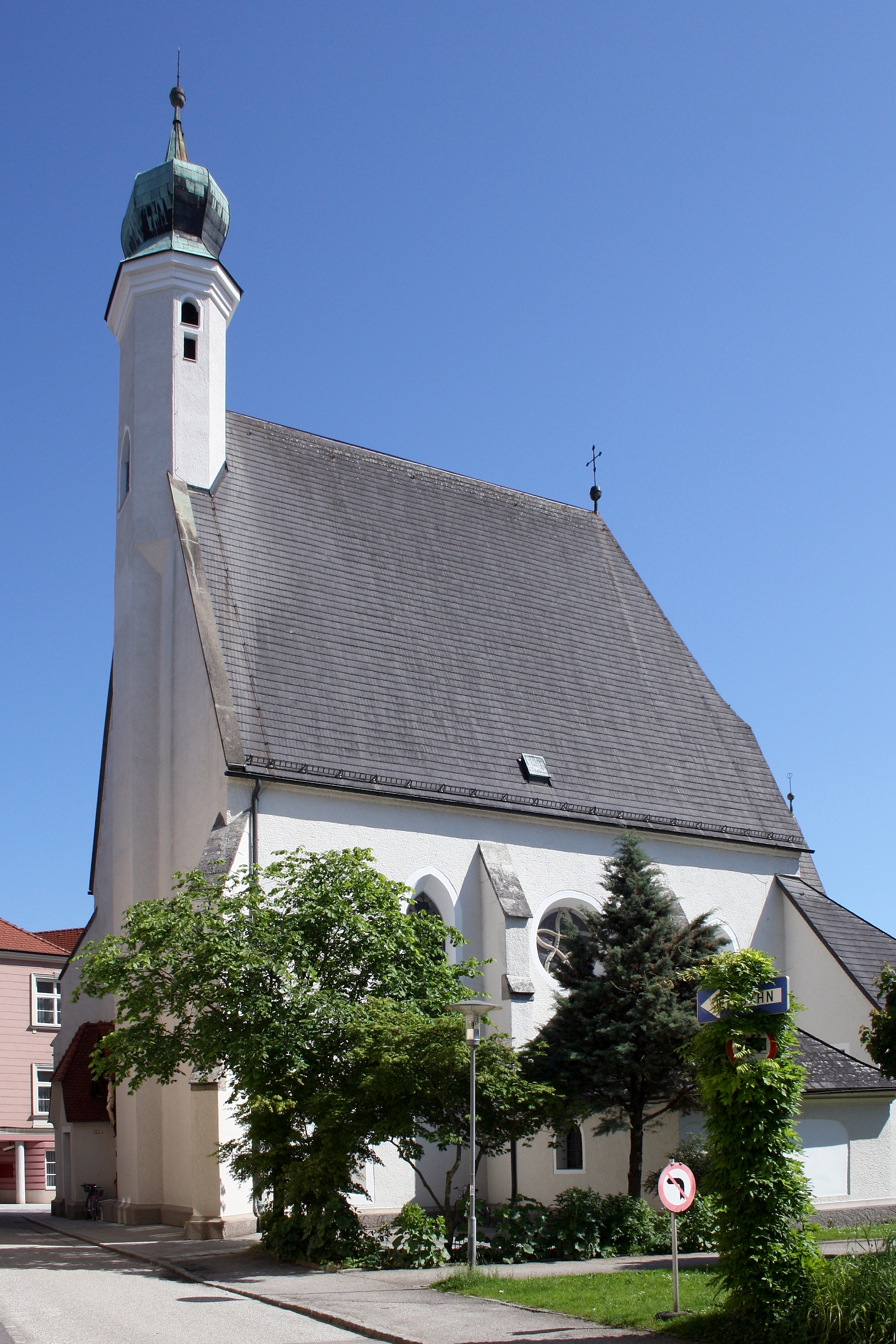 Südwestansicht der Stadtpfarrkirche St. Ulrich in der oberösterreichischen Stadt Vöcklabruck.